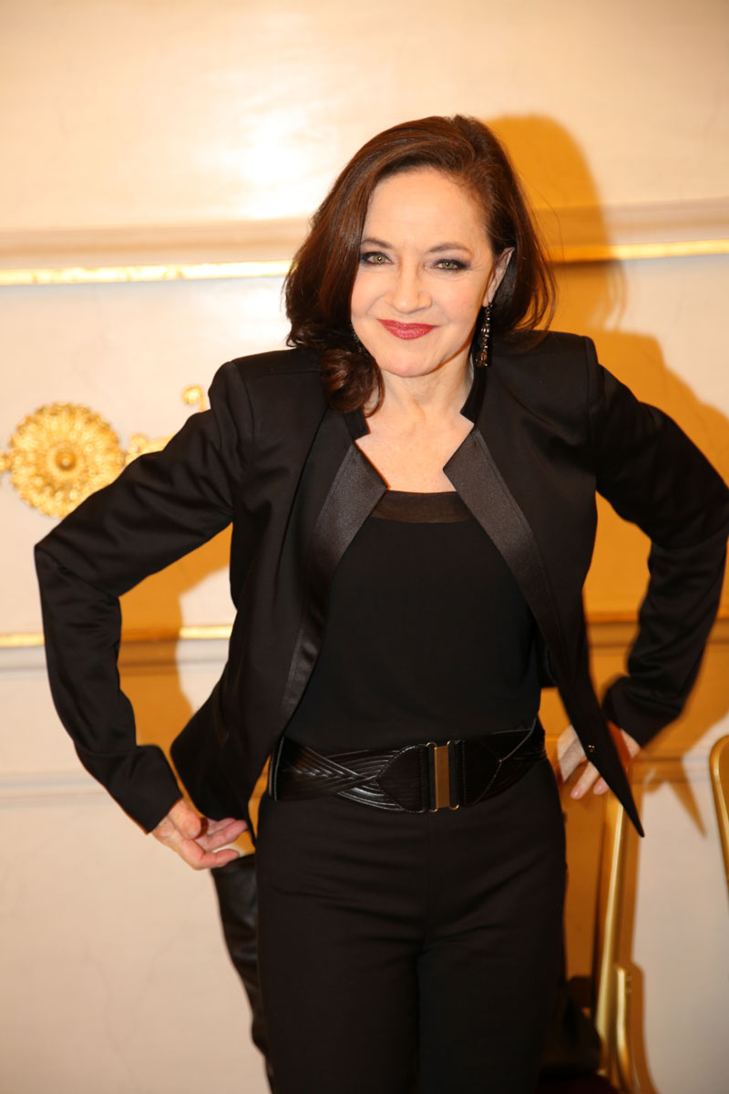 Maria Bill-8528